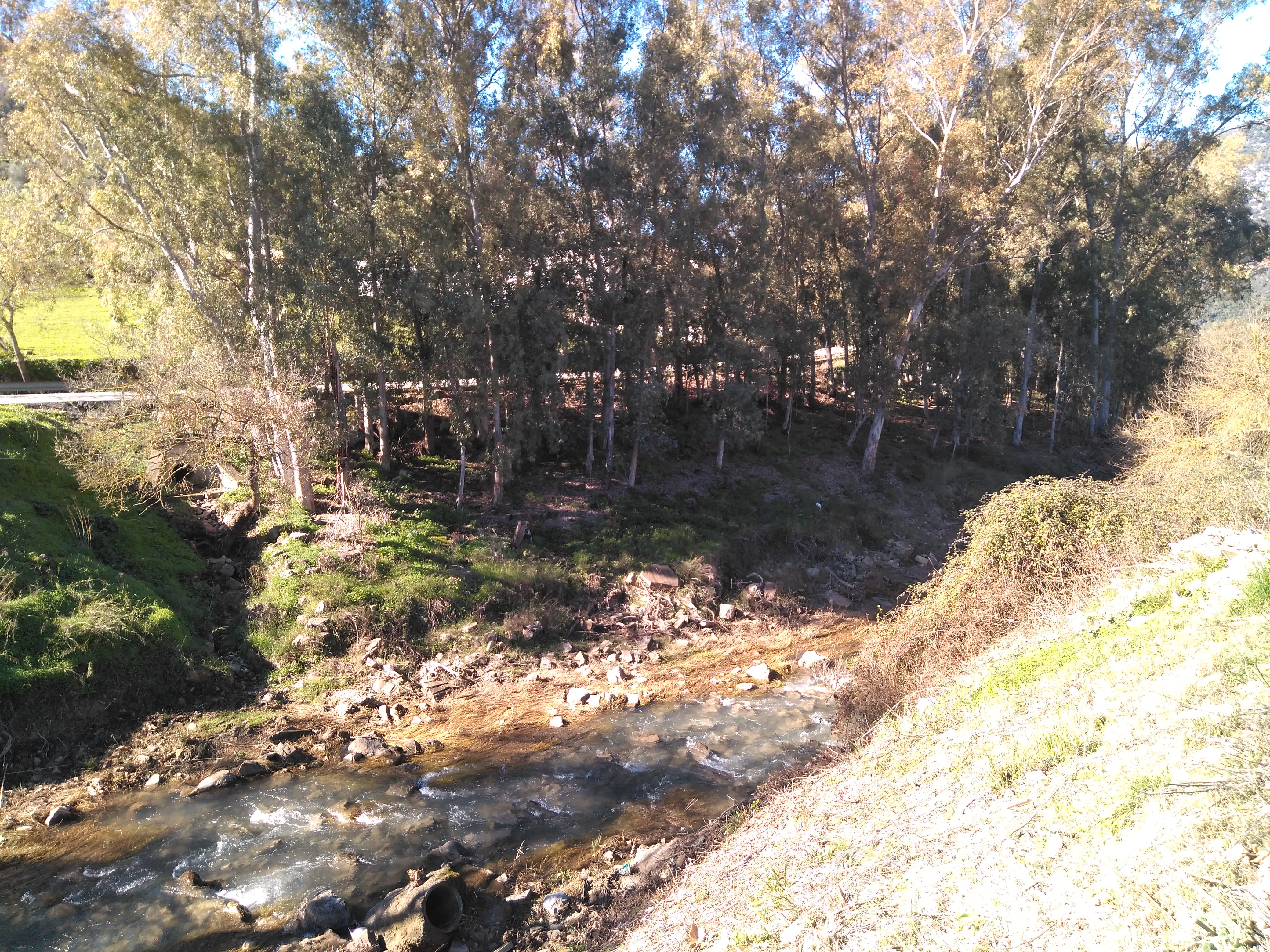 Río Ubrique, España